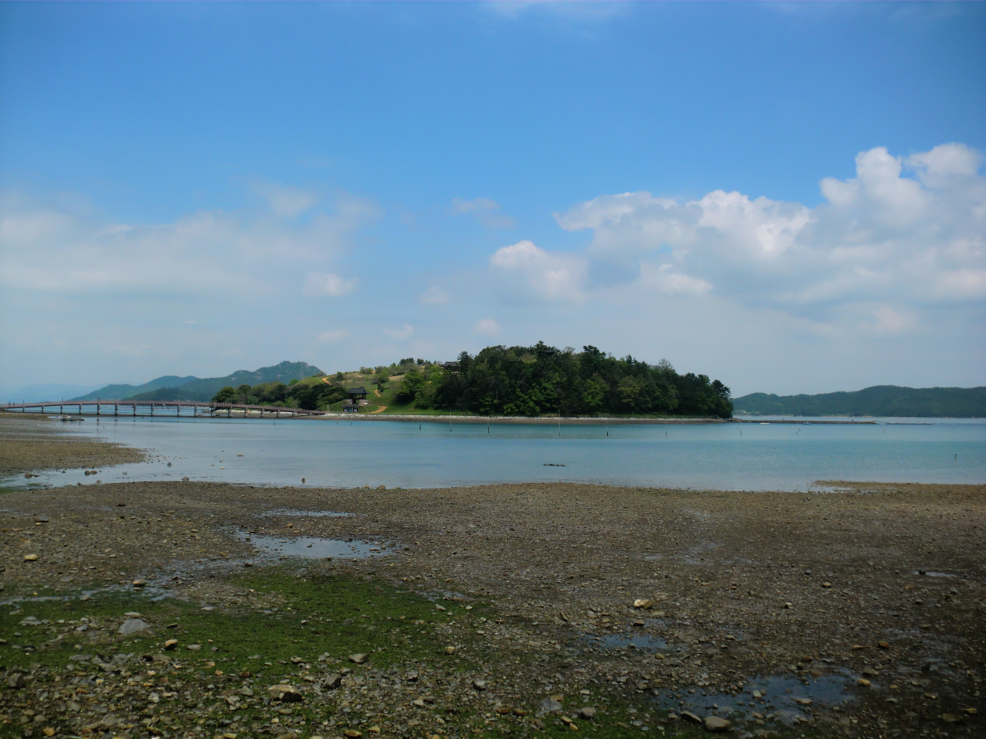 완도군에 있는 장도